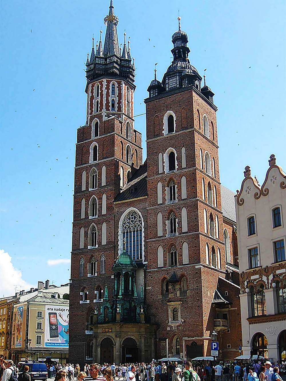 Kraków - kościół parafialny p.w. Wniebowzięcia NMP (Mariacki)